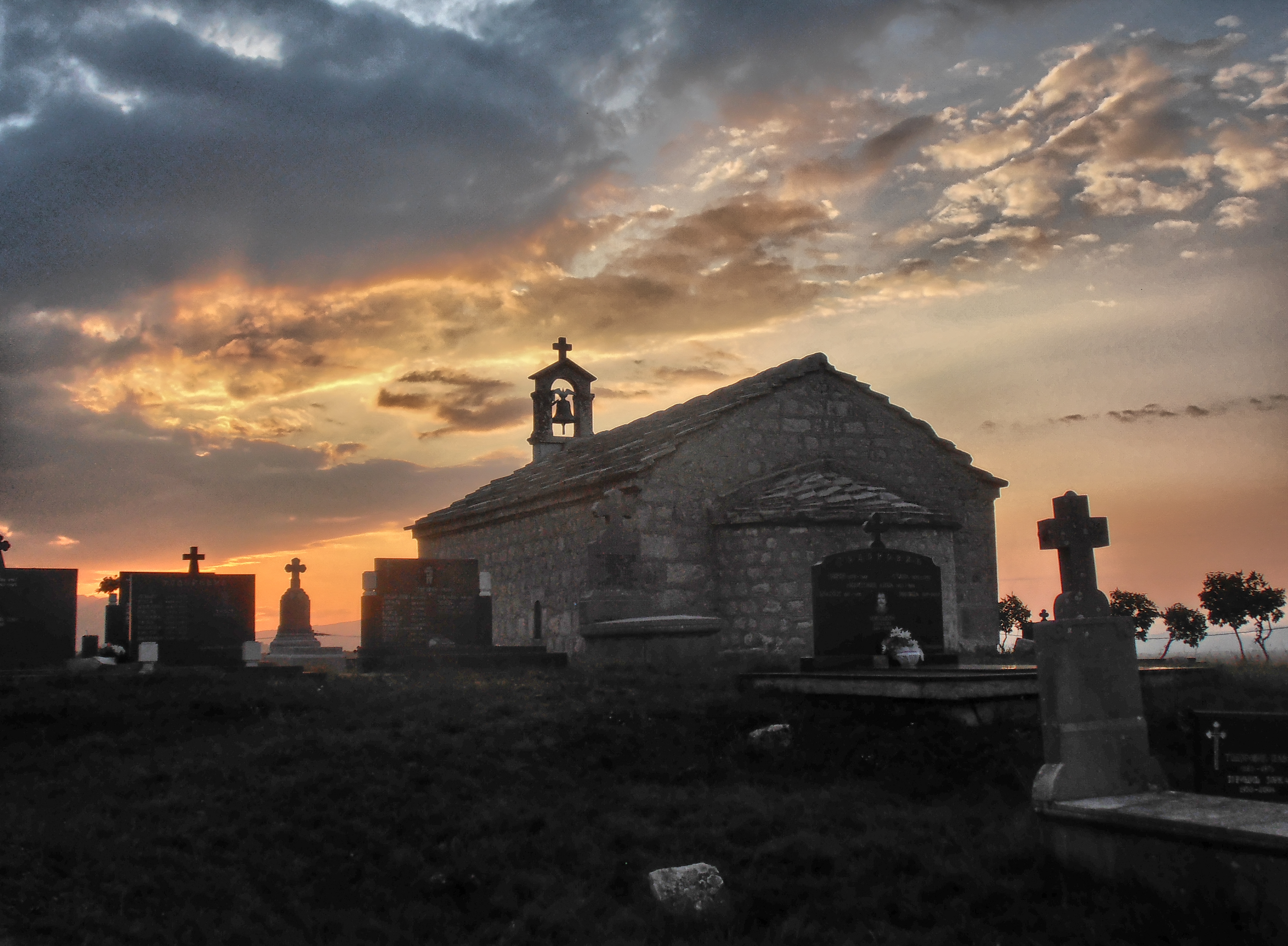 NKD300 Храм Светог Николе у селу Добреља. Не зна се година кад је саграђен, из ранијег је периода. Постоји податак о обнови из 1884/9. 2001. године је обновљен и освећен